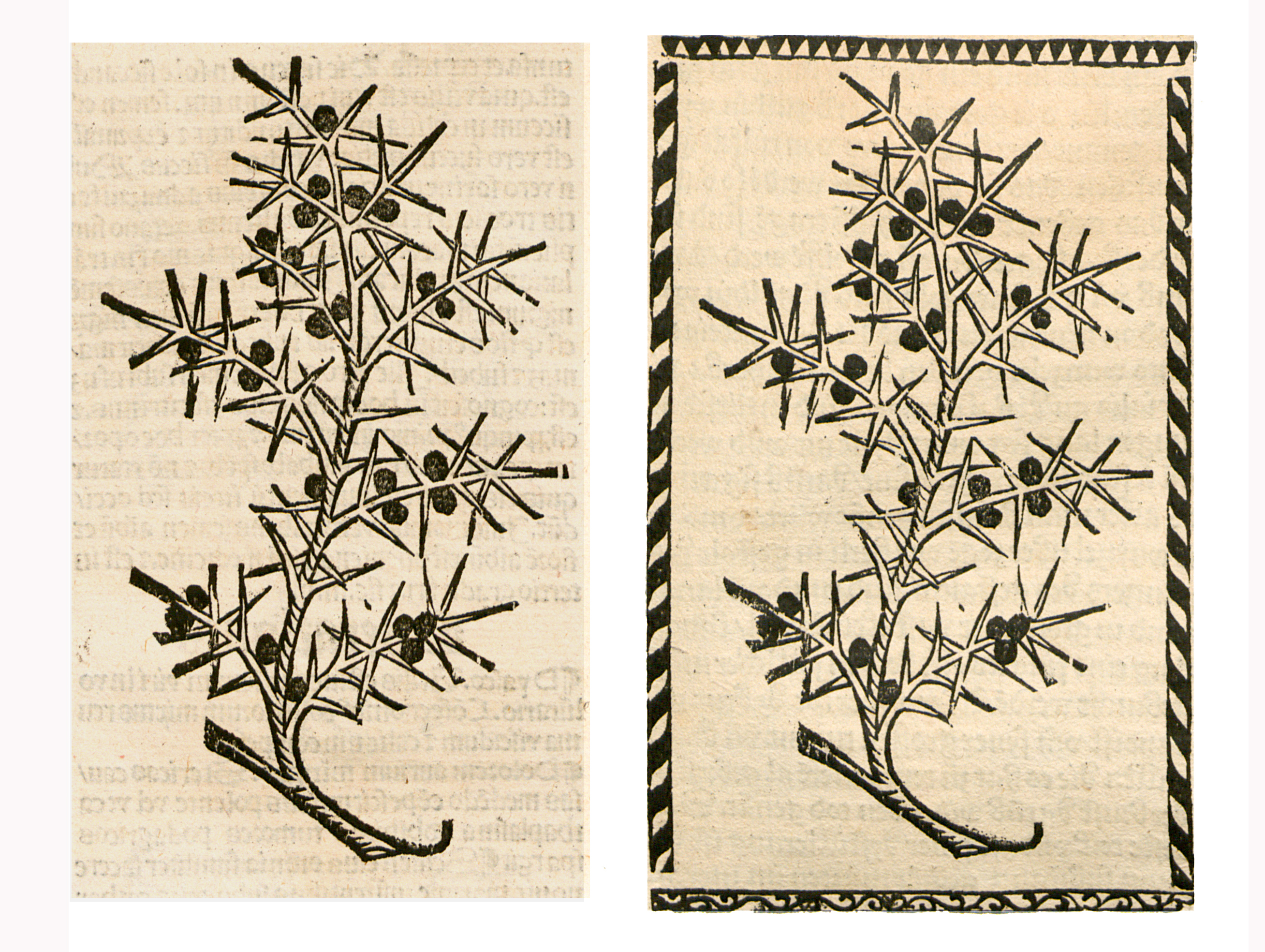 Abbildung von: Weckolter Ber (Juniperus communis)